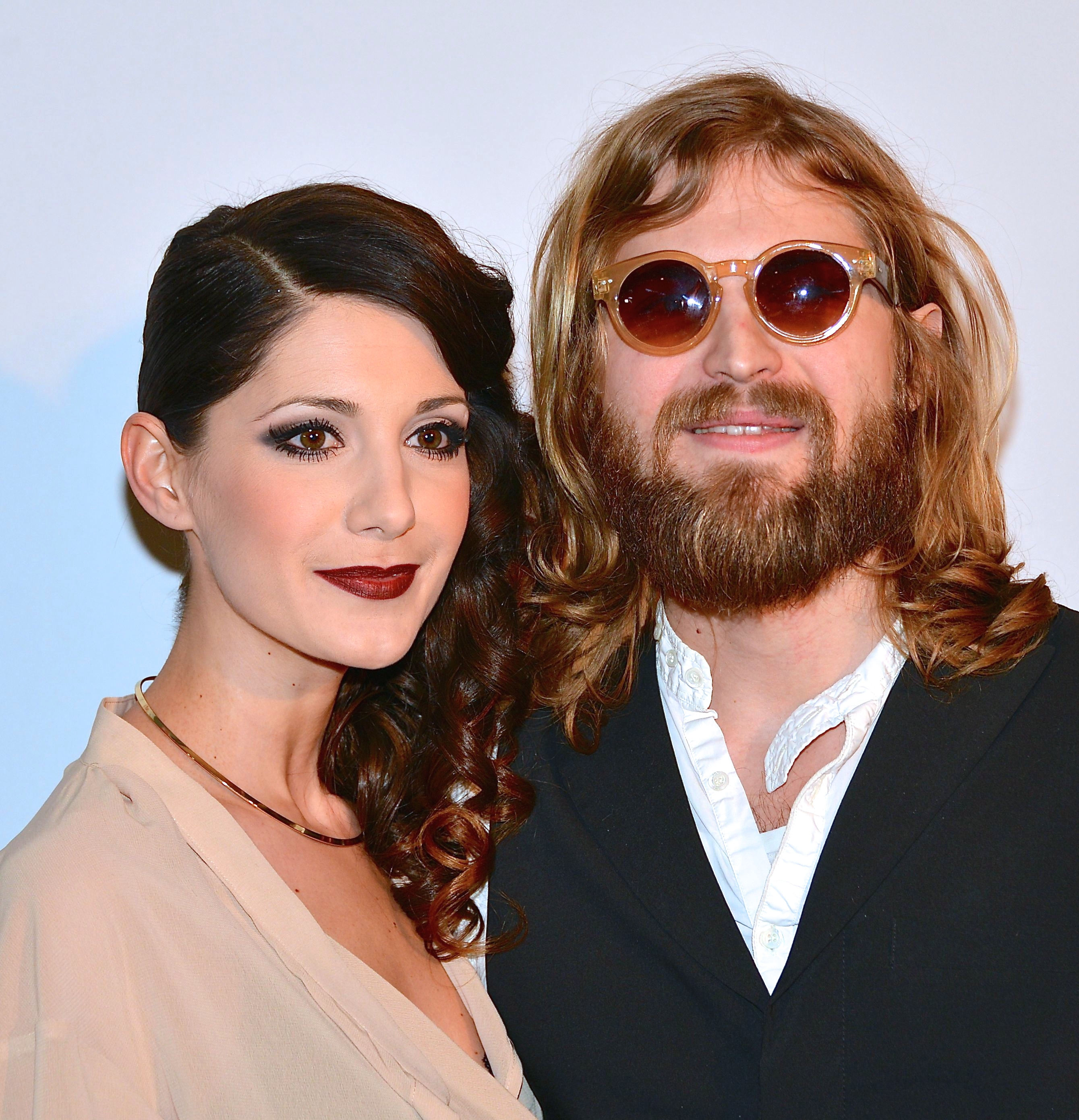 Nina Zanjani & Joel Hammar på på Guldbaggegalan 2013 den 21 januari 2013.